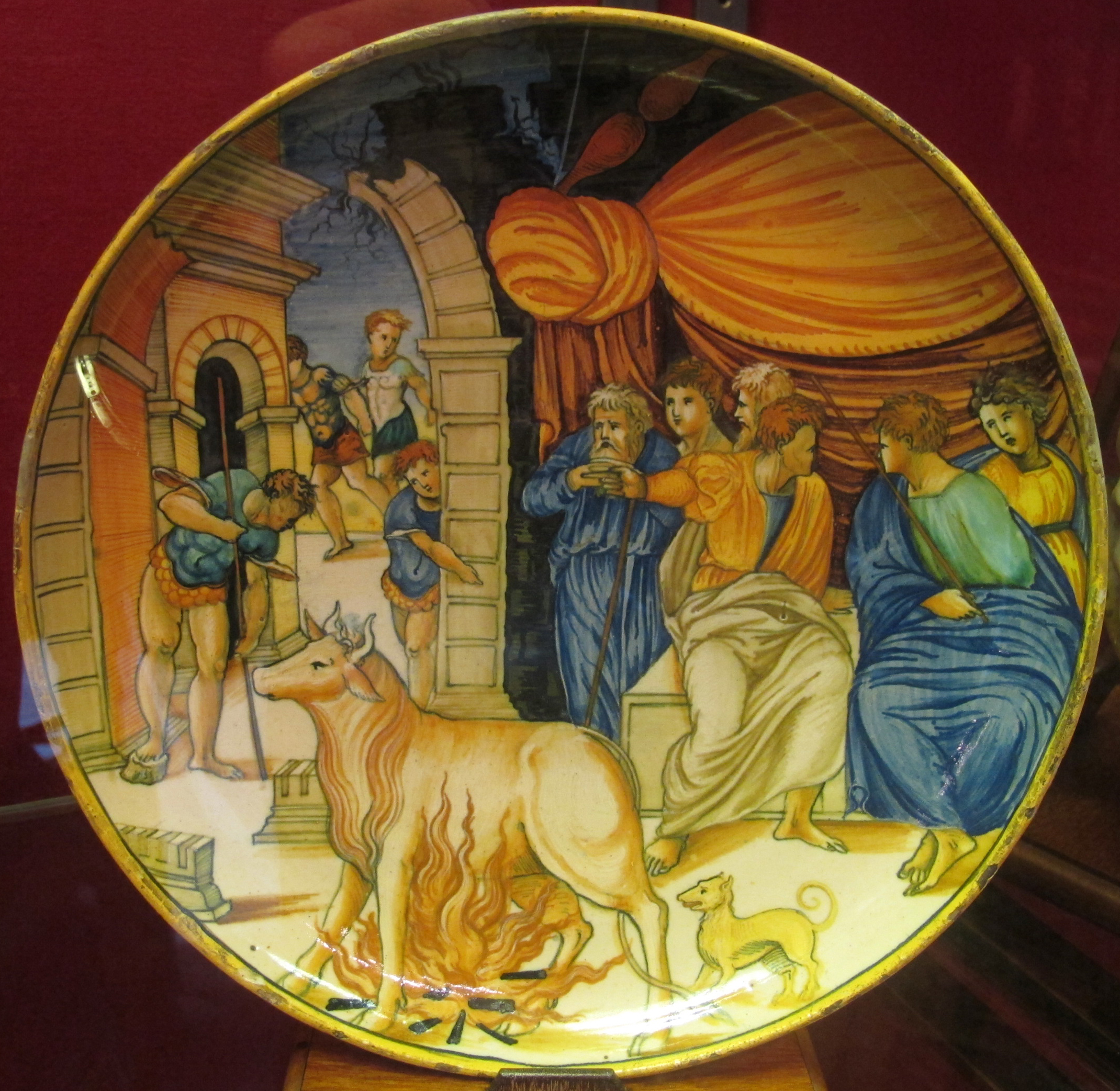 Urbino, cerchia di nicola da urbino, toro di falaride, 1530 ca.